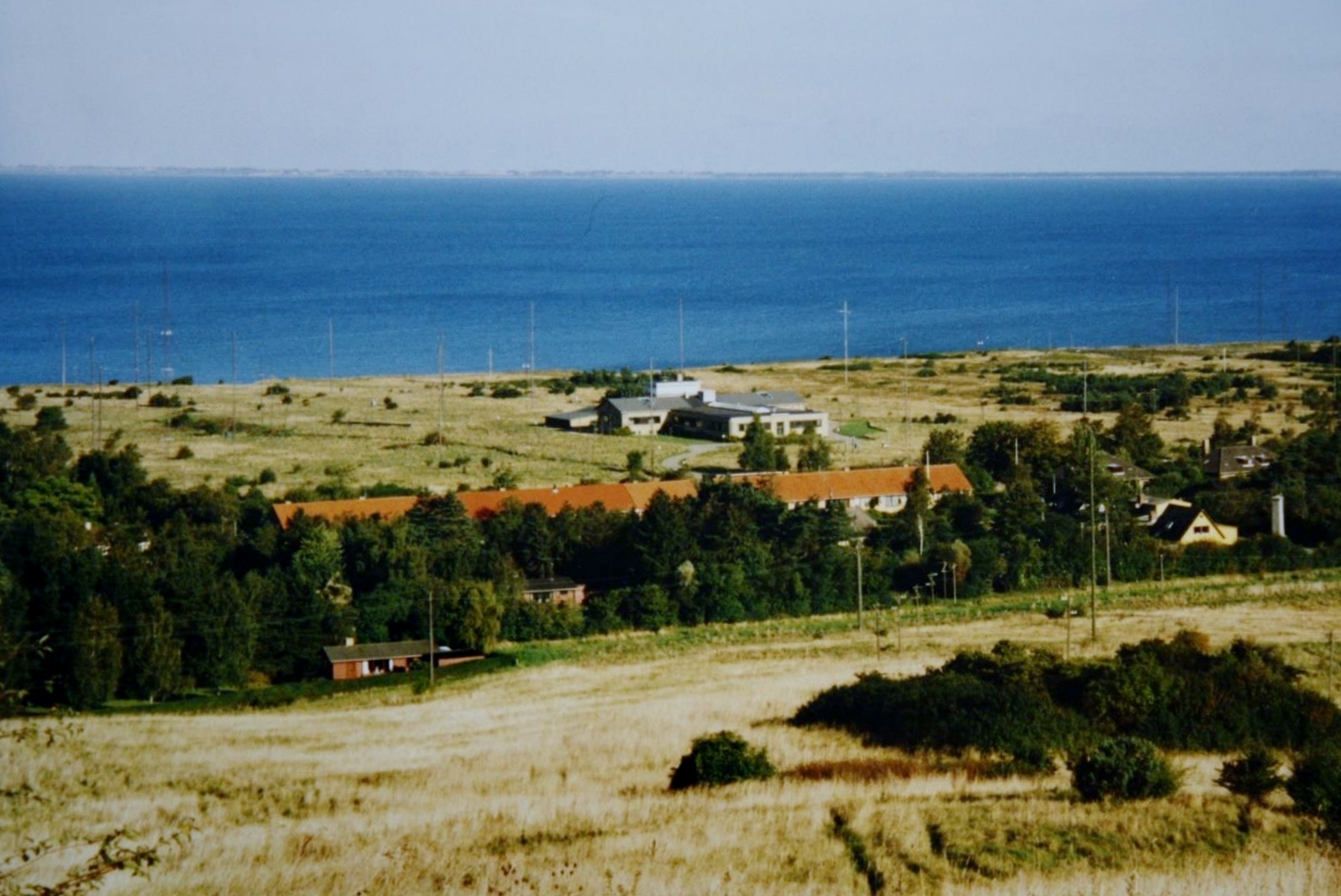 Skamlebæk Radio set fra foden af radiokædetårnet.